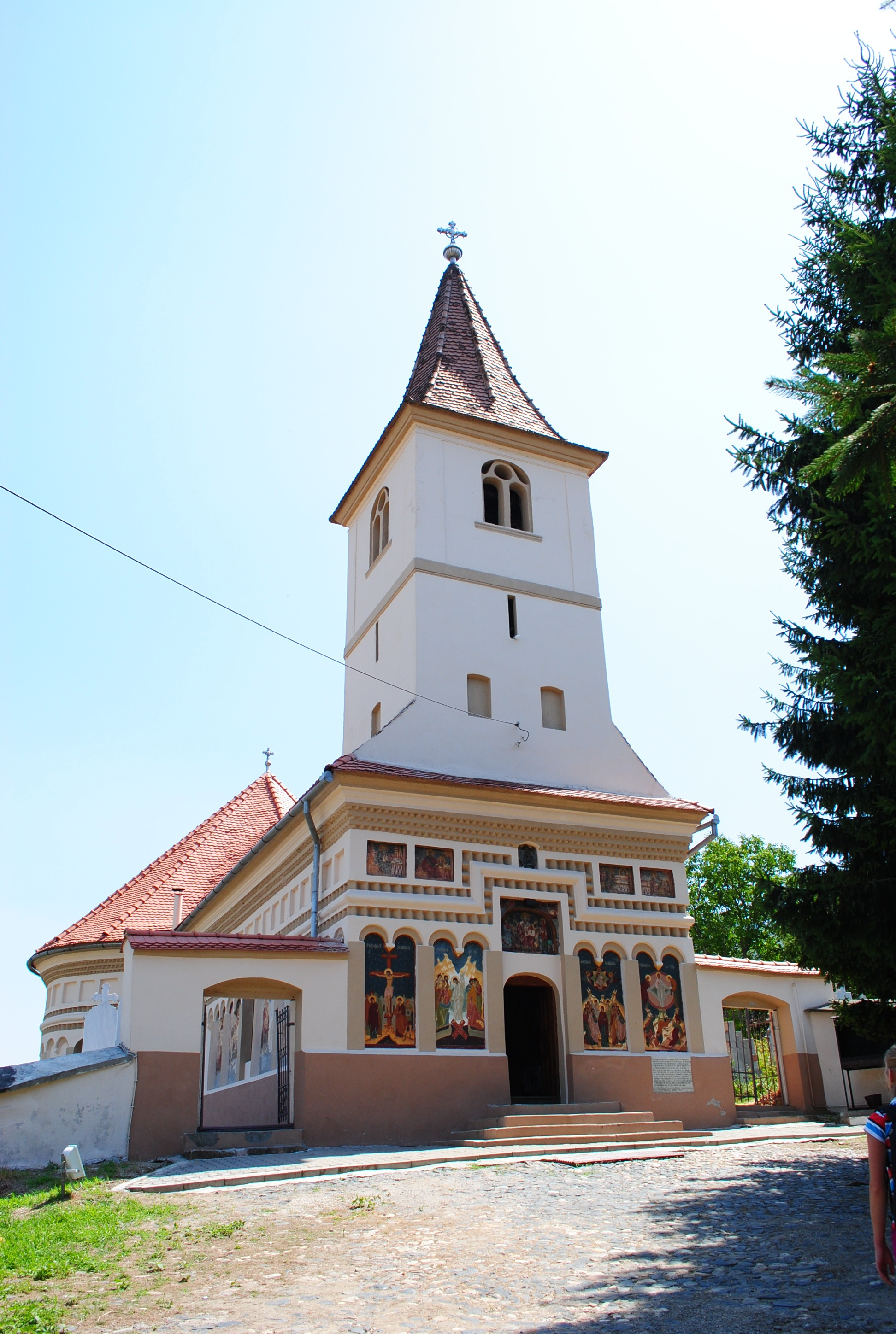 Biserica "Sf. Nicolae"-Porcești, 1653,1827 - 1828; refaceri sec. XX